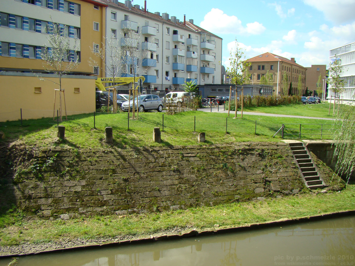 Alte Steinmauer und Treppe am Wilhelmskanal in Heilbronn